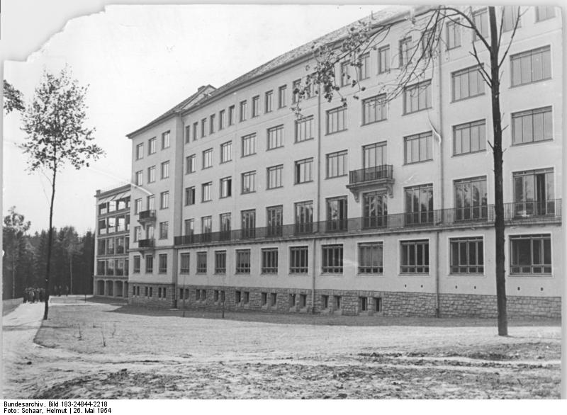 Bad Berka, Tbc-Krankenhaus Zentralbild TBD (Schaar) 31.5.1954 Tbc-Heilstätte Bad Berka ihrer Bestimmung übergeben. In Bad Berka-Thür. wurde am 26. Mai 1954 die grösste und modernste Tbc-Heilstätte Deutschlands (einige Gebäude befinden sich noch im Bau) in Anwesenheit des Ministers für Gesundheitswesen Luitpold Steidle ihrer Bestimmung übergeben. UBz: Ansicht des hinteren Seitenflügels vom ersten Bauabschnitt der Tbc-Heilstätte.